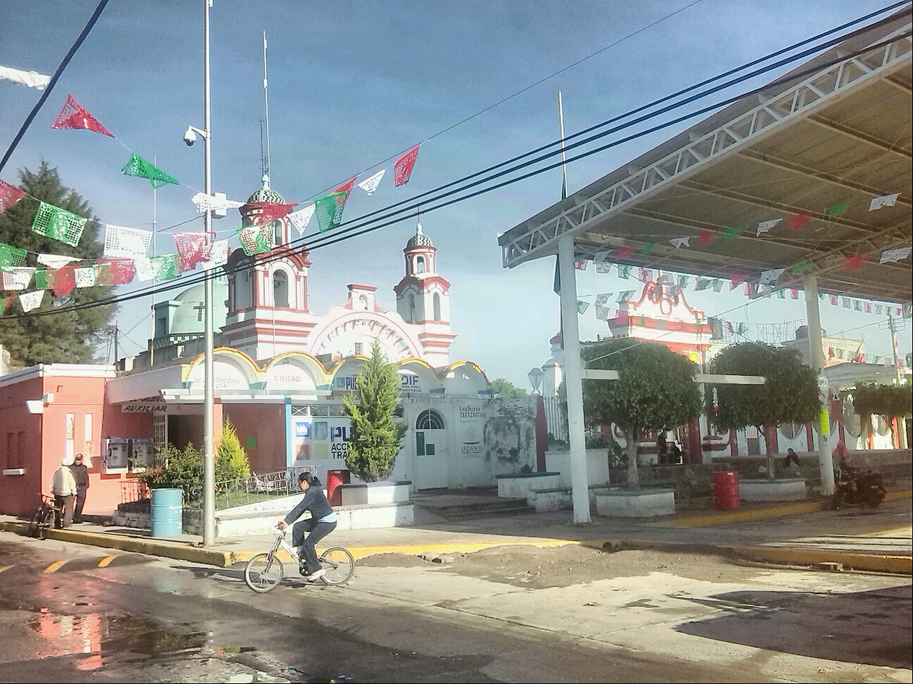 Plaza principal. San Lucas Atoyatenco, Puebla